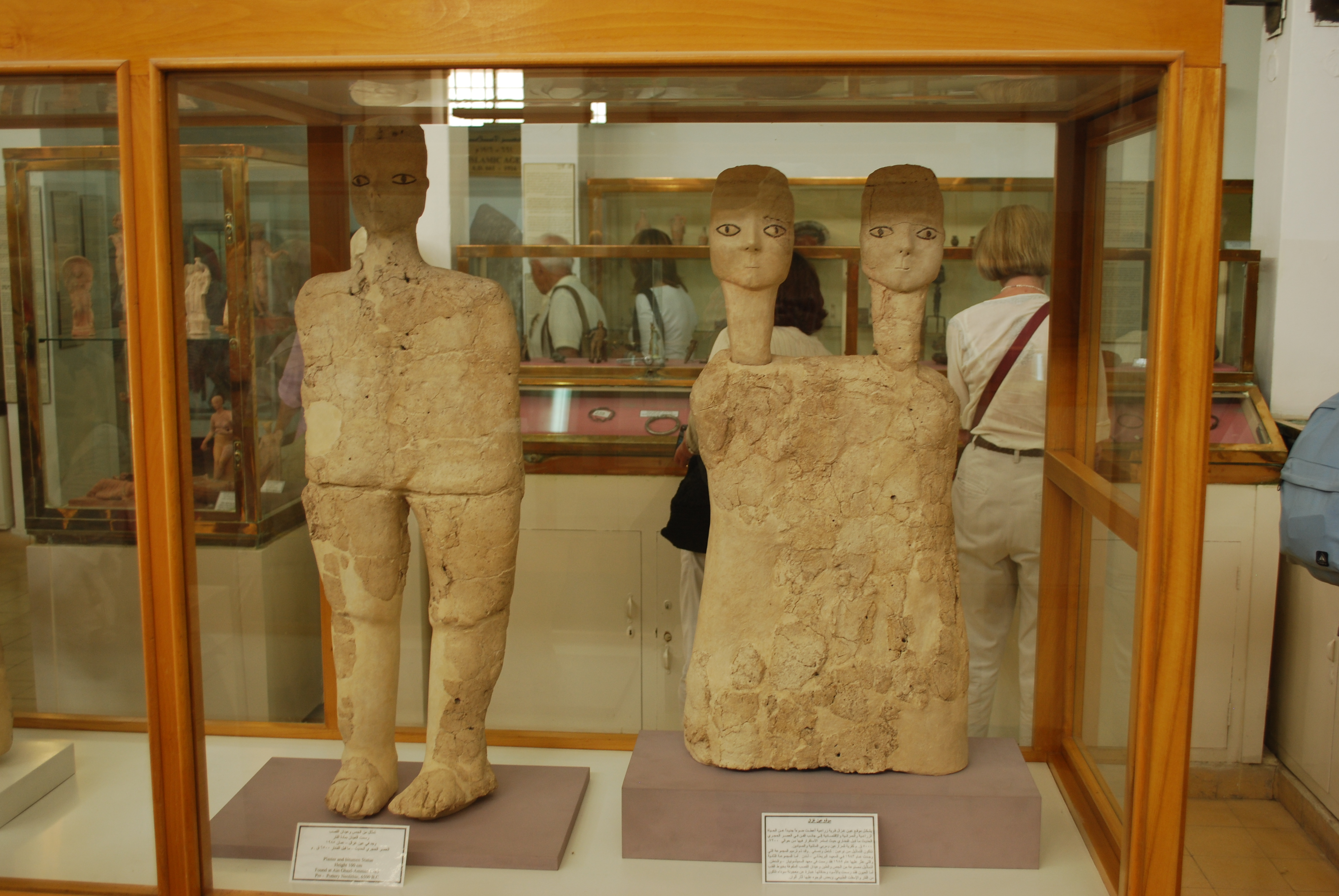 Les statues d'Ain Ghazal, au Musée archéologique de Jordanie (Citadelle d'Amman).